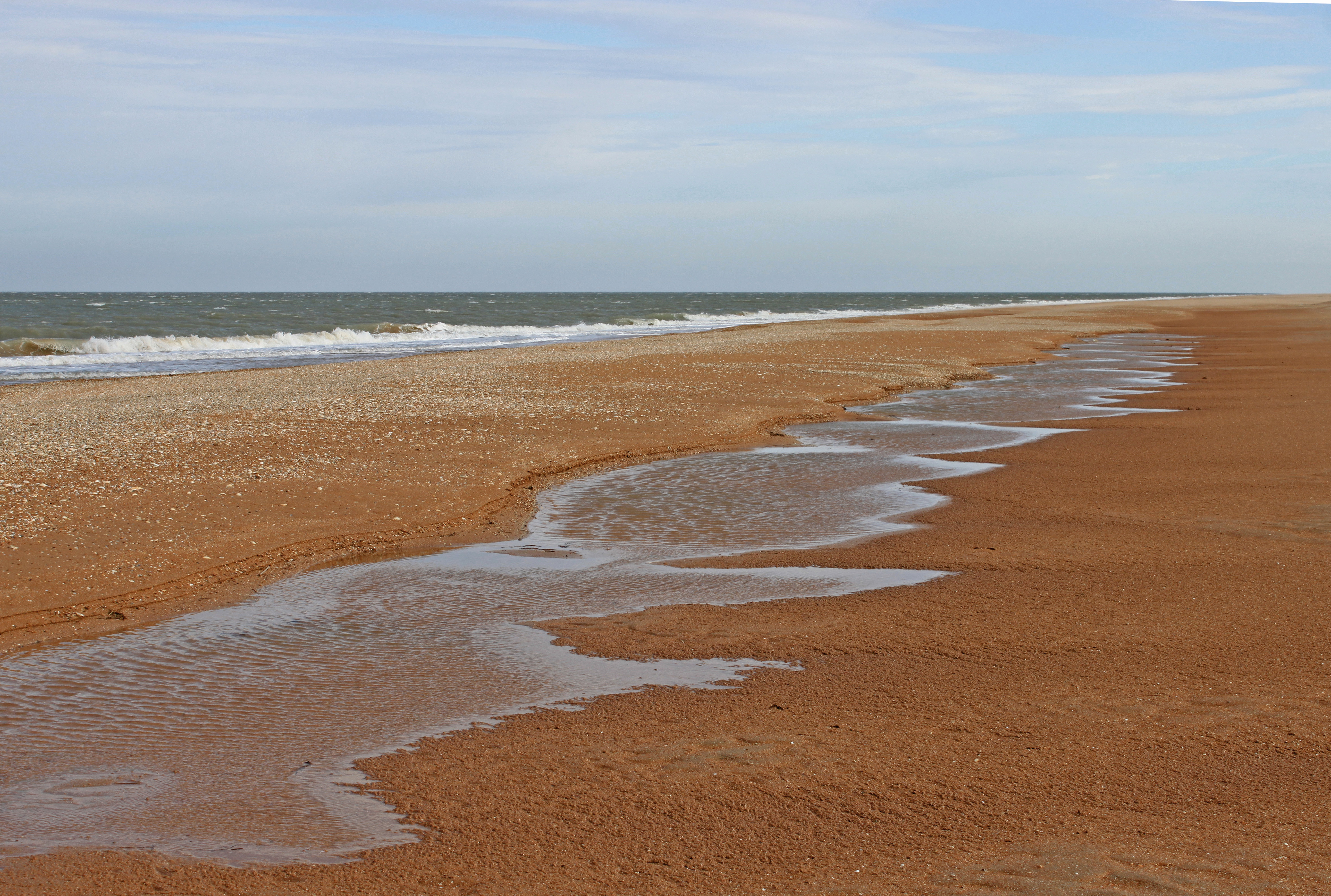 Арабатський ботанічний заказник.